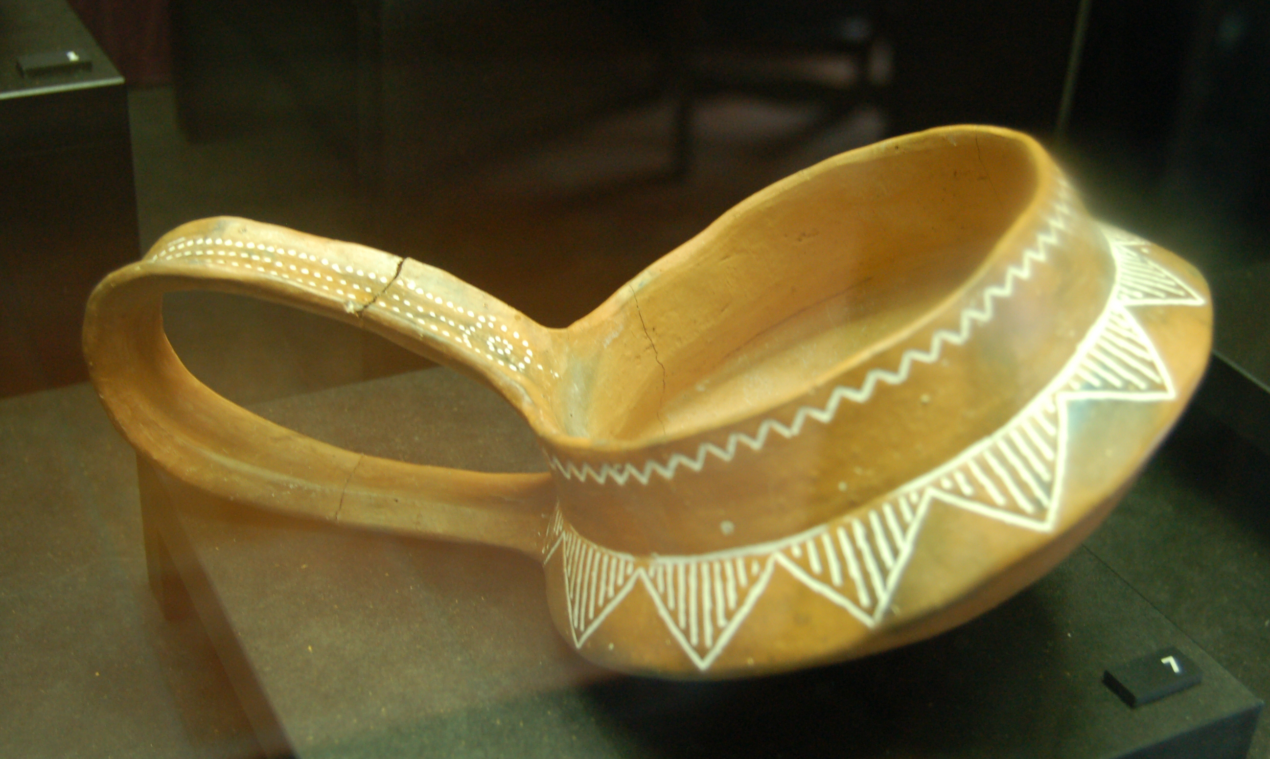 Nachbildung der Bandhenkeltasse aus der Grabkammer II.